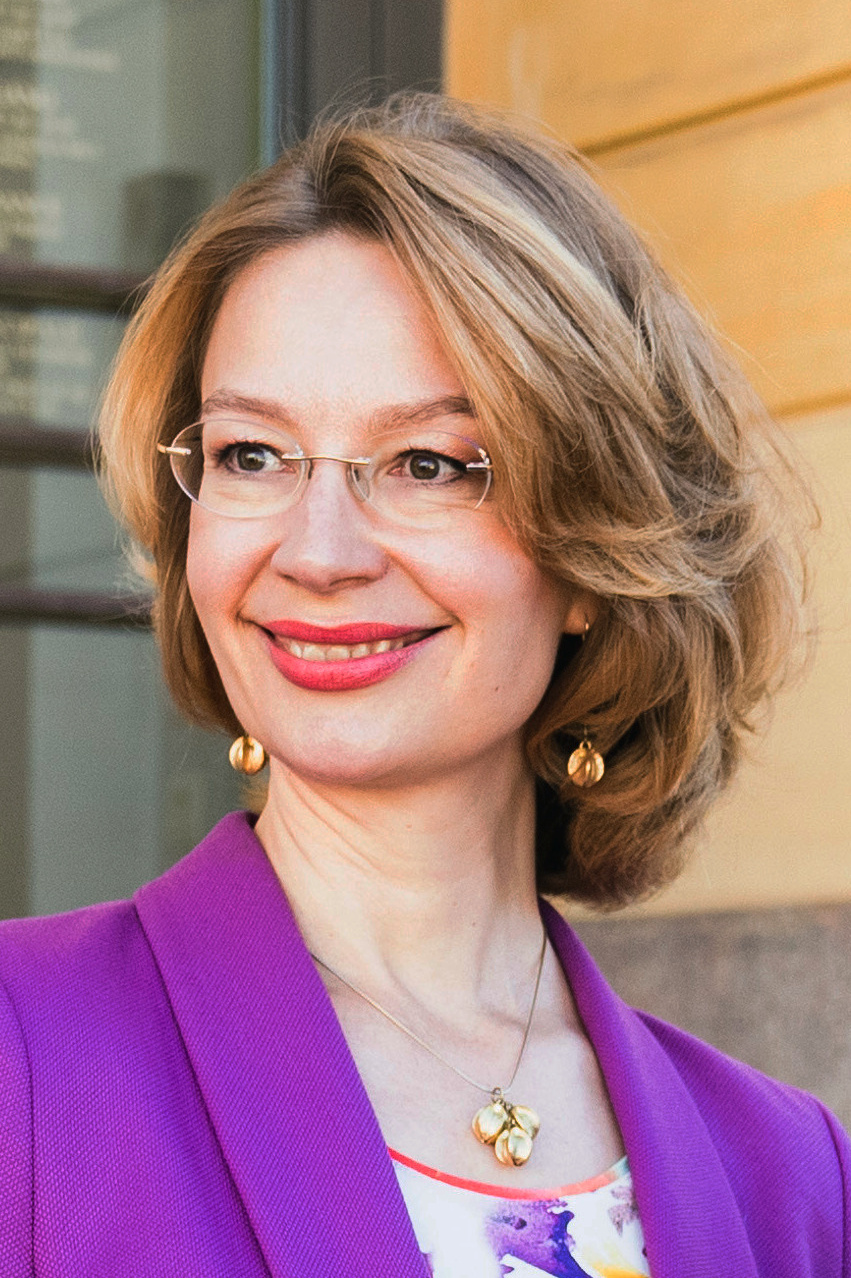 Alexander Schallenberg besucht Helsinki für bilaterale Gespräche, am 24. Juni 2019 Copyright: BMEIA/ Eugénie Berger